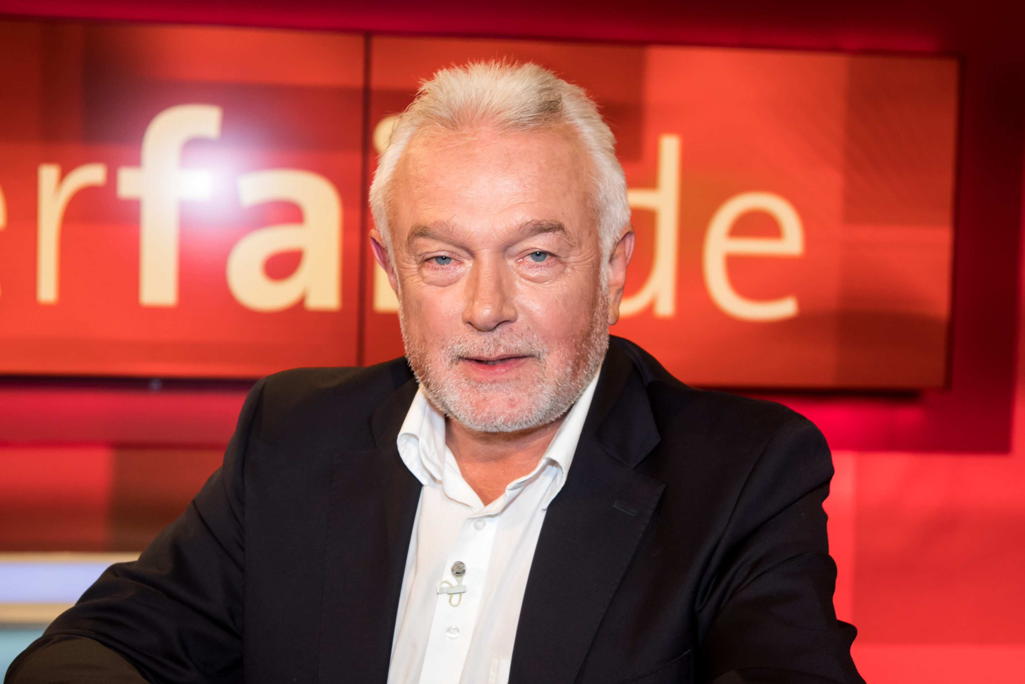 Wolfgang Kubicki in der WDR-Sendung "hart aber fair" am